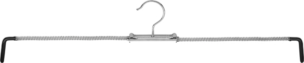 MAWA Rofit 50 - der von Martin Wagner entwickelte und patentierte Rockspanenr